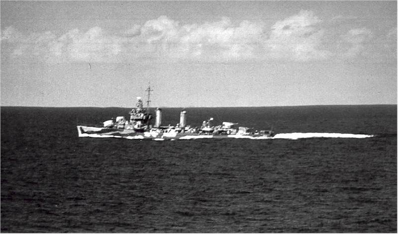 DD-454